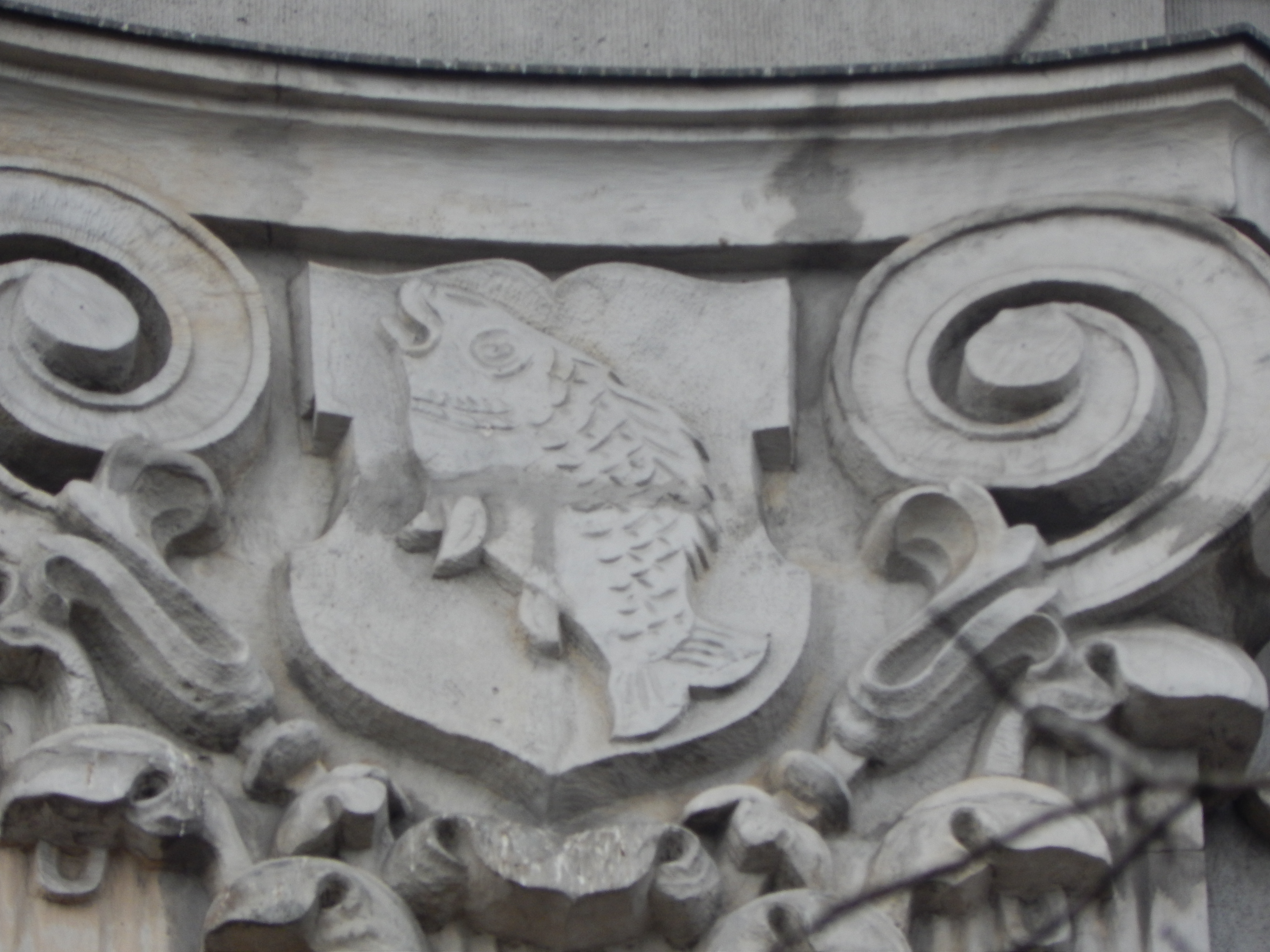 Fragment elewacji gmachu Sejmu Śląskiego - herb Rybnika